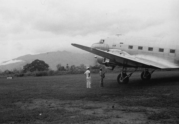 negatief. Dakota op een vliegveld bij Maoemere of Ende